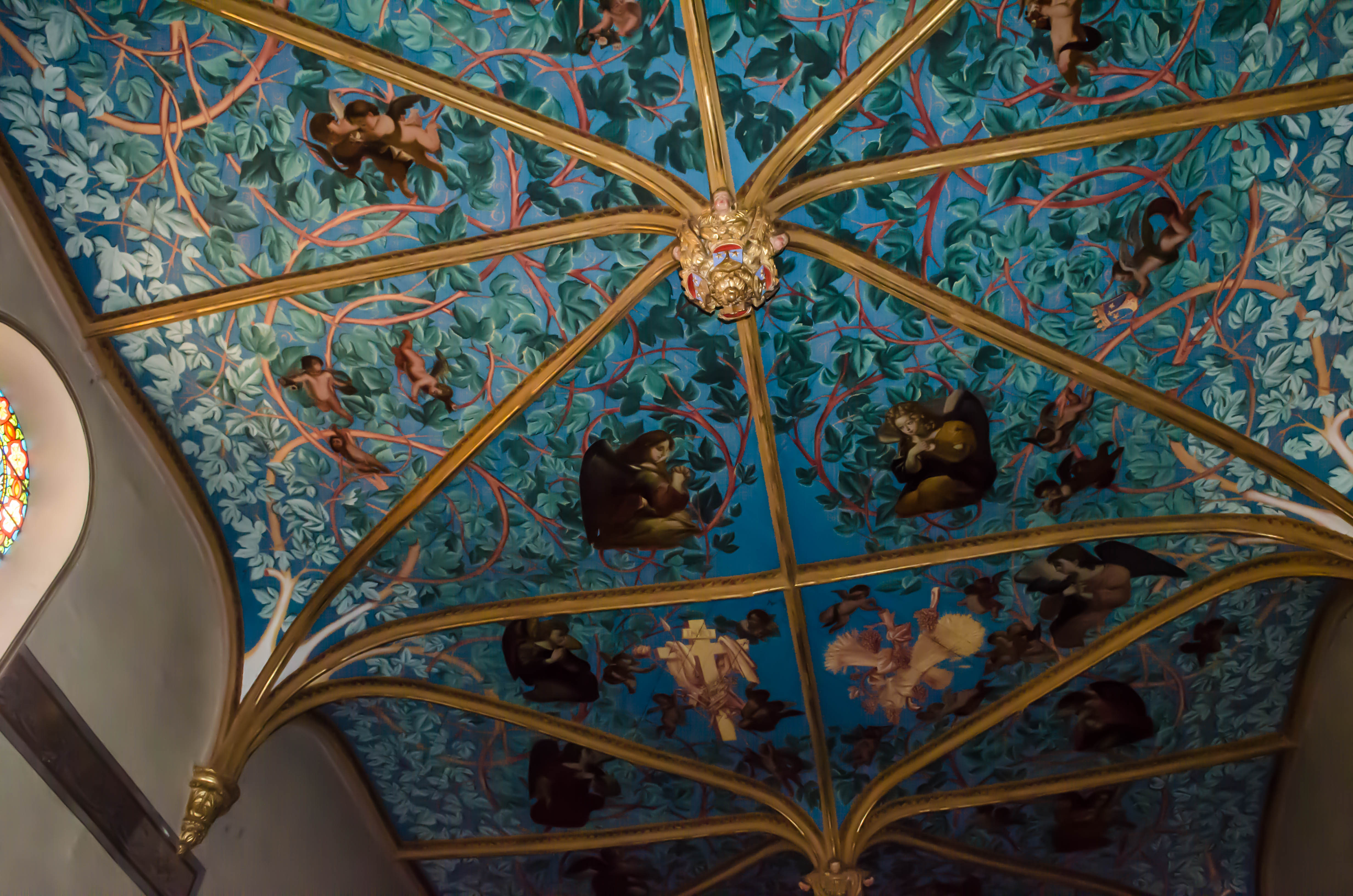 Lectoure (Gers, France), chapelle des Carmélites (XVIIe s.), plafond.